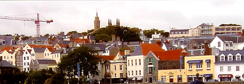 Guernesey